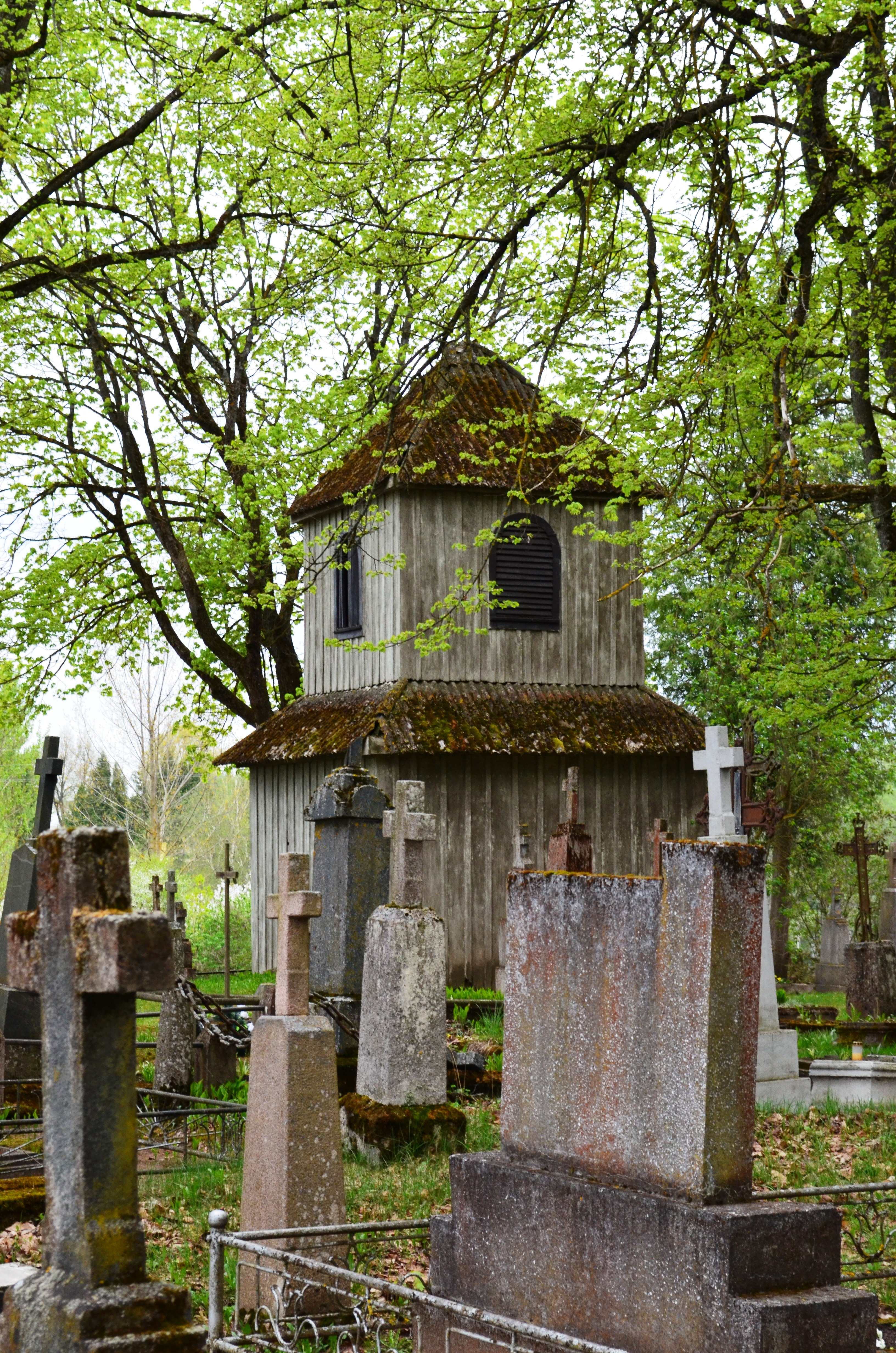 Pajieslio bažnyčios varpinė, Krakių sen., Kėdainių r.